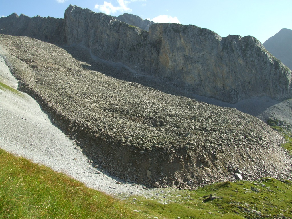 Aktiver Blockgletscher, Lange-Wand-Kar, Zillertaler Alpen, Tuxer Hauptkamm.